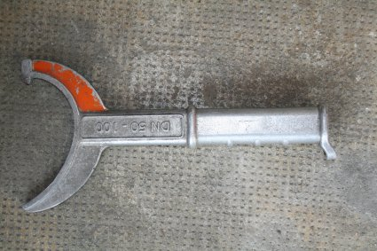 Clé tricoise de 100 mm des sapeur-pompiers français